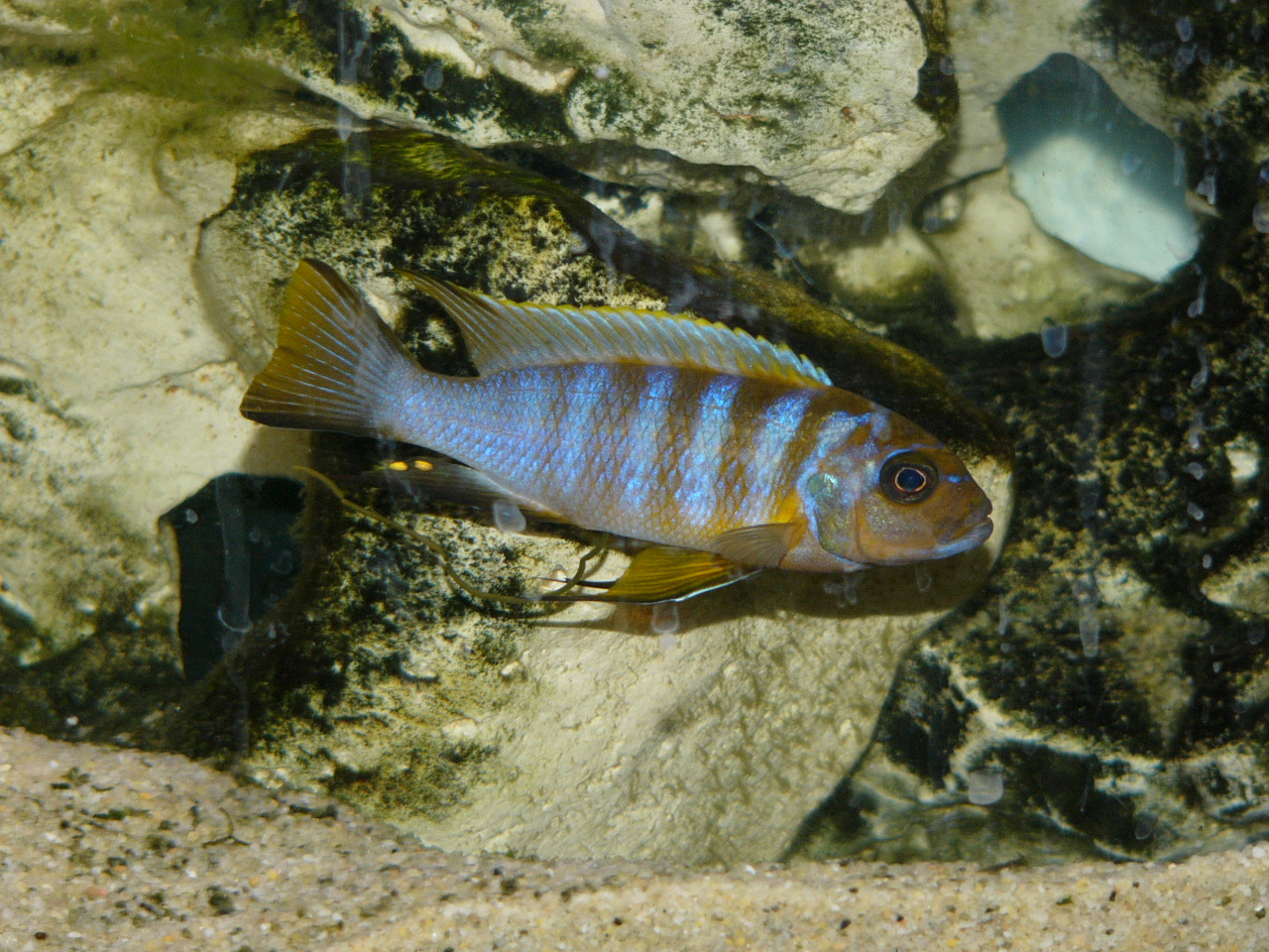 Speudotrophéus blue (poisson du lac tanganika)